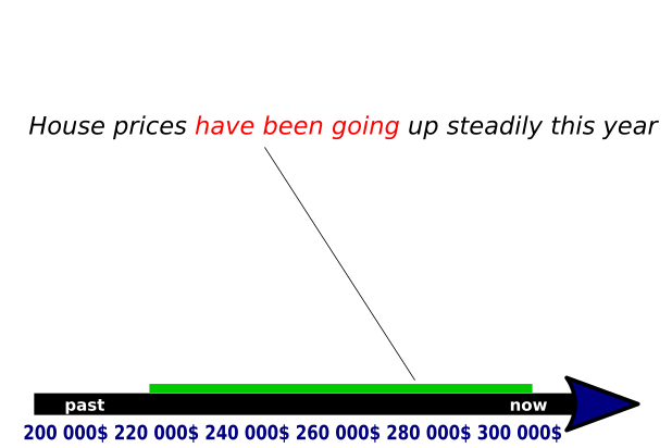 Czas Present perfect progressive przy czynności trwającej w teraźniejszości